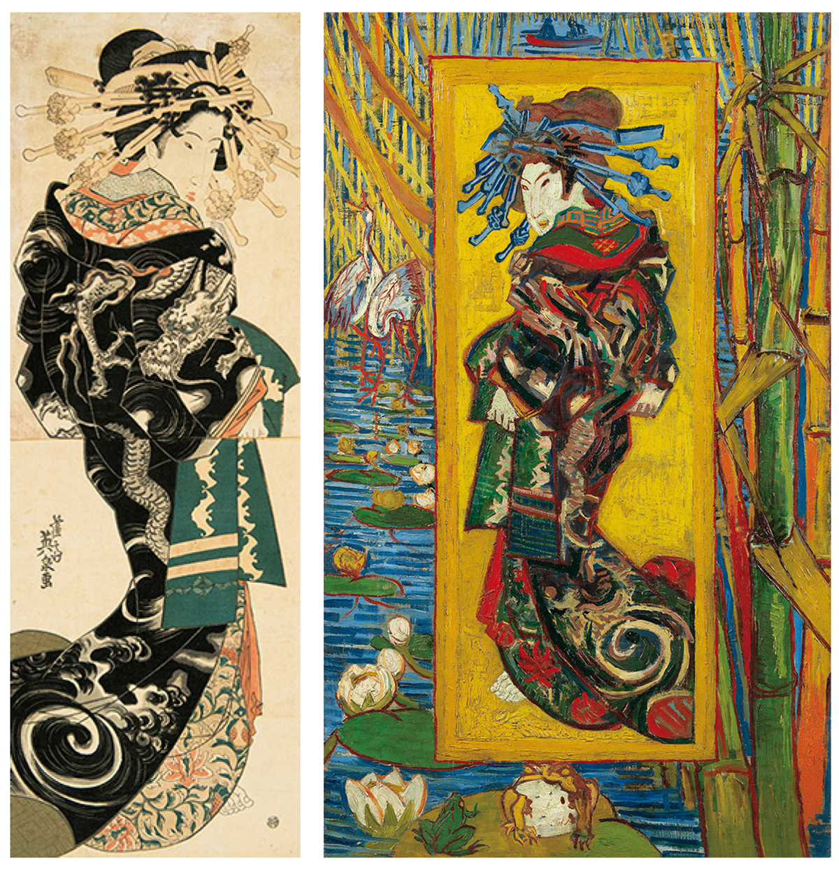 Dame (Ikeda Eisen) und Kopie (van Gogh)